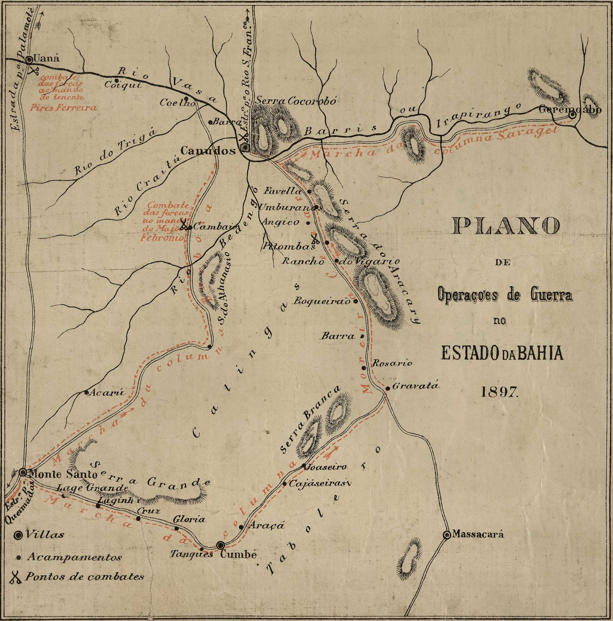 Canudos [Cartográfico] : plano de operações de Guerra no Estado da Bahia.